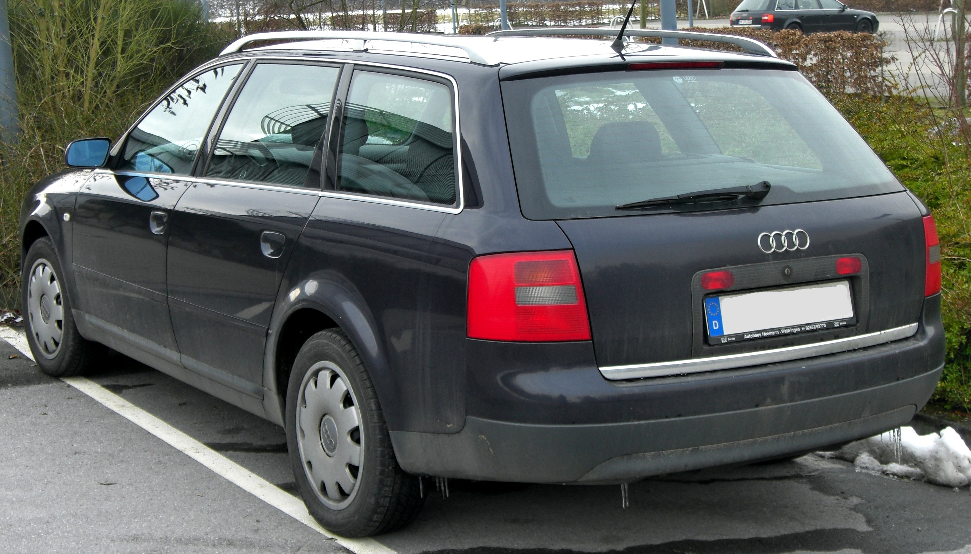 Audi A6 Avant